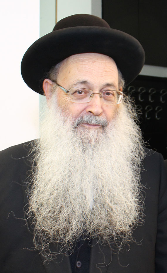 רב שכונת יד אליהו וחבר מועצת חכמי התורה